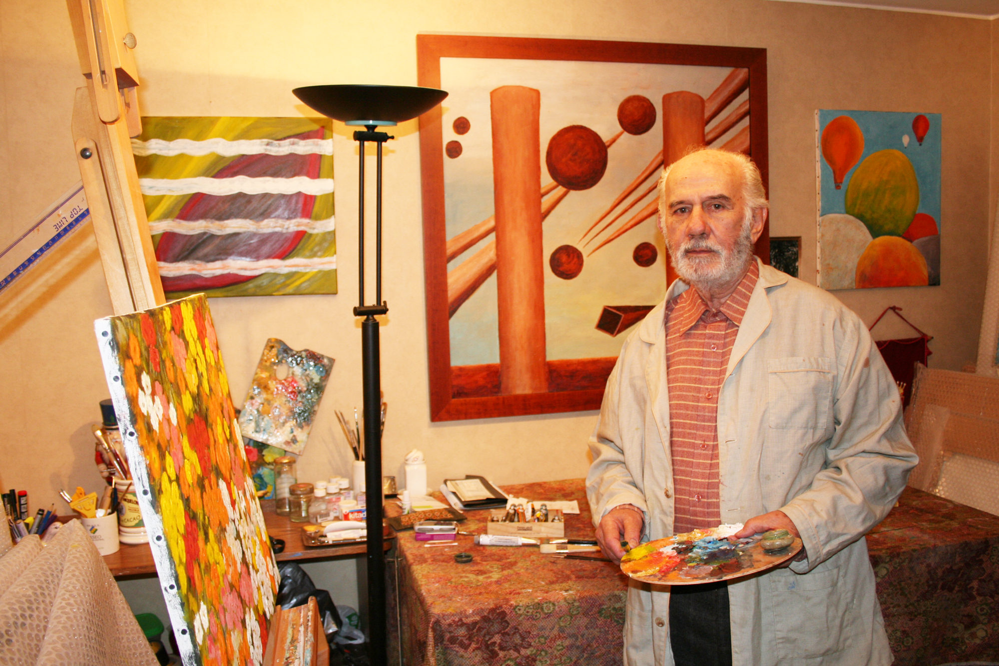 El pintor y poeta Eugenio Cruz Vargas (1923 - 2014) en su taller mientras se realizaba la exposición del año 2008 en la sede del Centro Cultural Montecarmelo del Instituto Cultural de Providencia. Chile. Autor de la fotografía: José Cruz, quien en calidad de autor y propietario titular de la misma otorgó el consentimiento para publicar y difundir en la red internet esta imagen bajo las condiciones que establece la Licencia de Uso CreativeCommons, Atribución-Compartigual 3.0 Unported (CC BY-SA 3.0).